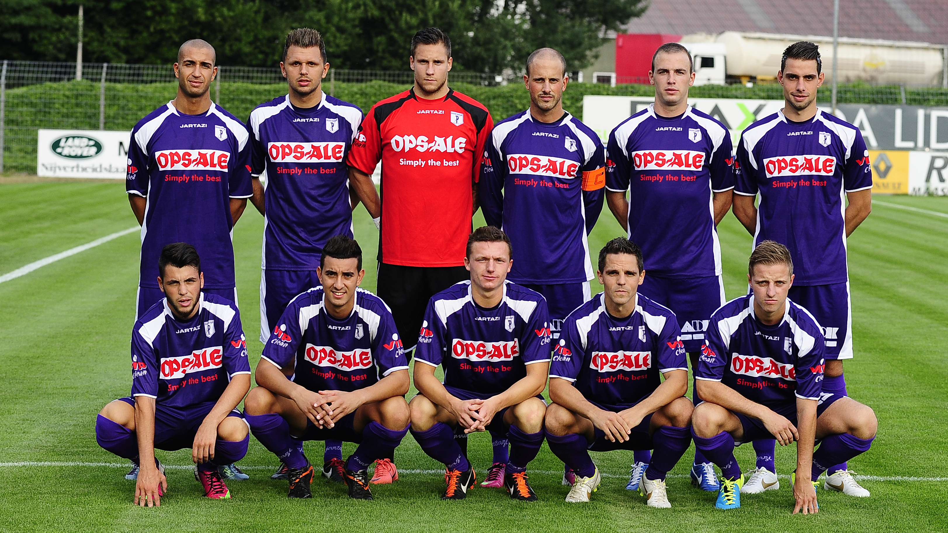 Een selectie van spelers van Patro Eisden tijdens een oefenwedstrijd tegen CS Visé op 17 juli 2013: Samir Bouhriss - Dylan Lambrecht - Kevin Debaty - Davy Sroka - Koen Hustinx - Marco Battista - Tony Cinti - Mohamed Riyani - Martijn Stefani - Joeri Vastmans - Maxim Geurden